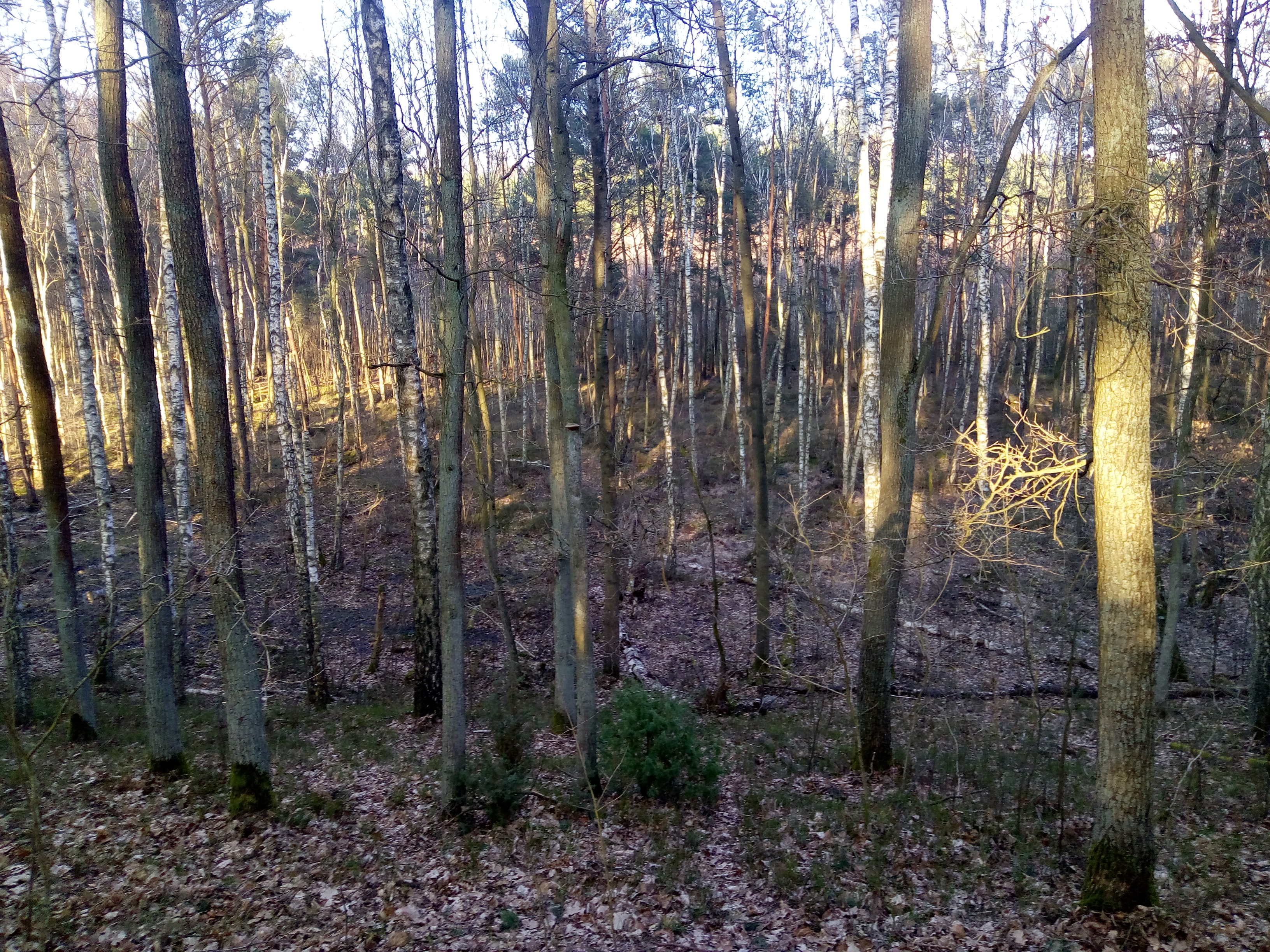 Widok na rezerwat przyrody Kopanicha od strony zachodniej